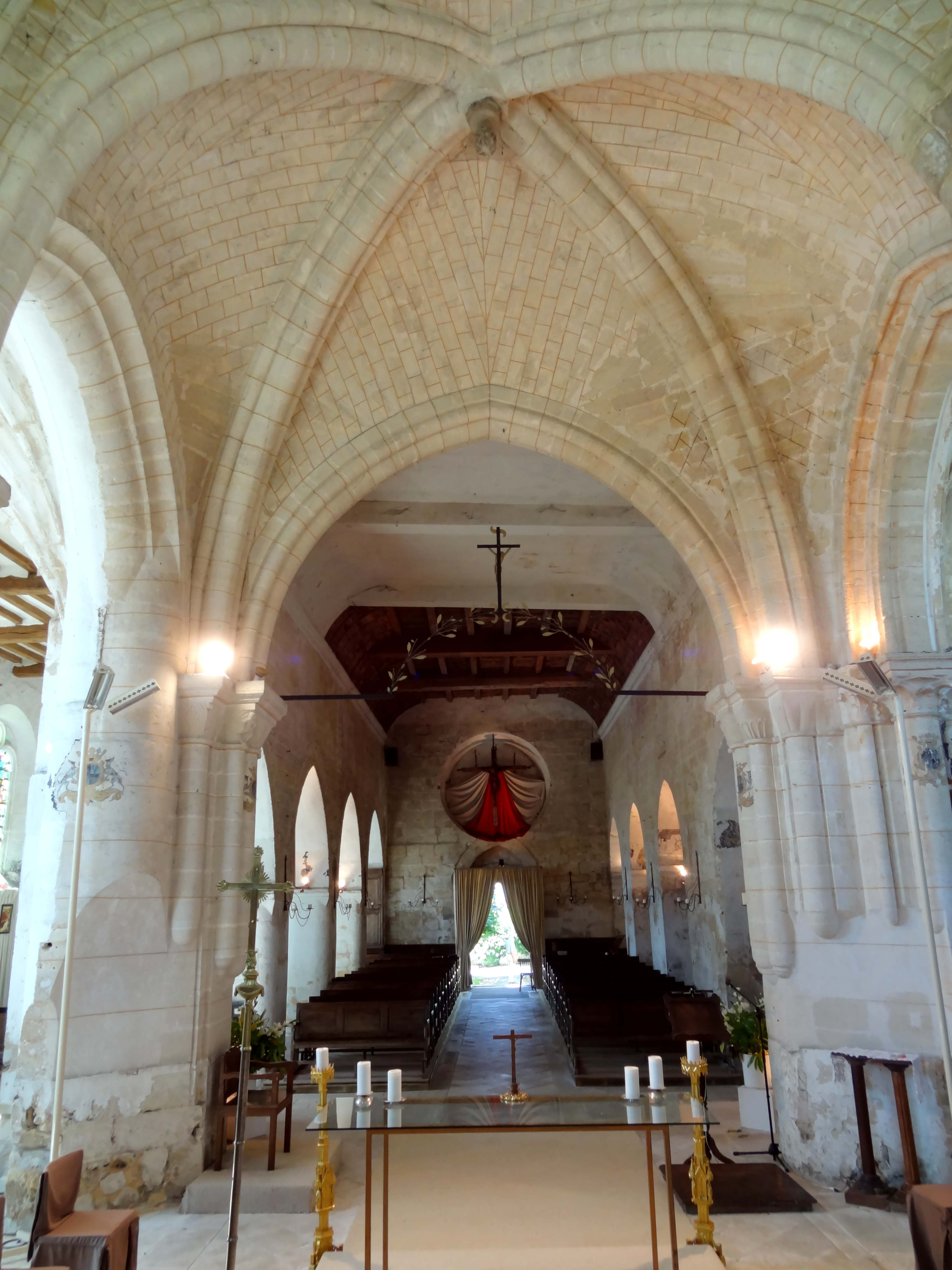 Intérieur de l'église - voir titre.